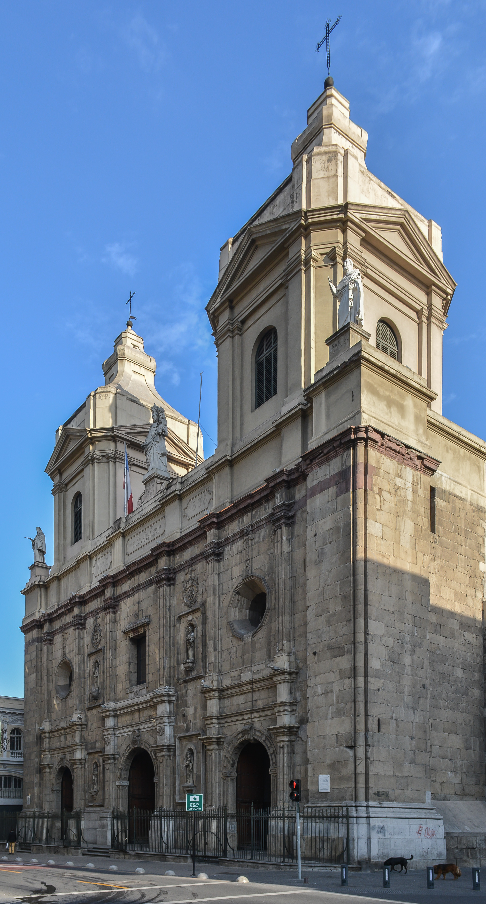 Iglesia de Santo Domingo, Santiago, Chile